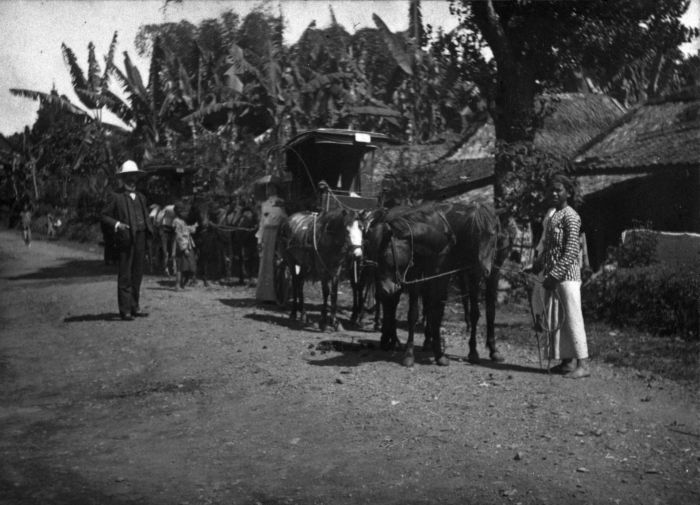 Foto. Twee overkapte rijtuigen met Netty, M. Treub en paardenknecht in Toegoe tussen Buitenzorg en Poentjak